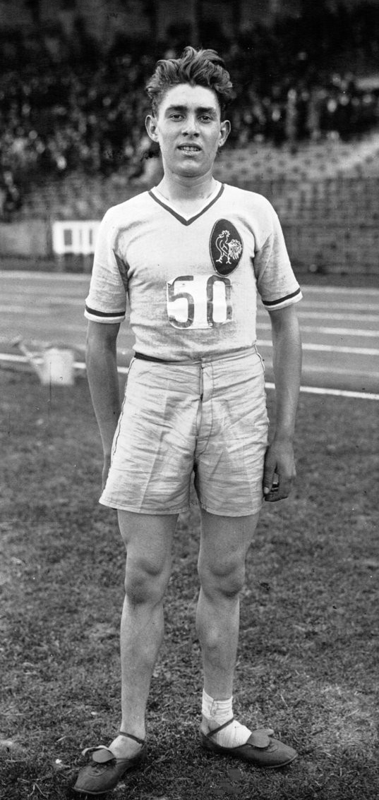 Match d'athlétisme France Angleterre : Ladoumègue (portrait) : [photographie de presse] / Agence Meurisse